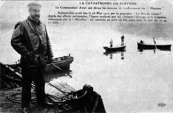 La catastrophe du Pluviôse. Le commandant Amet dirige les travaux de renflouement du sous-marin Le Pluviôse, qui coule le 26 mai 1910.